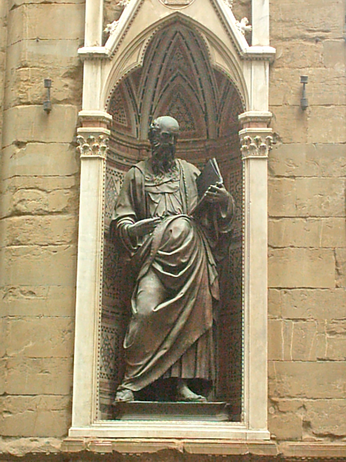 Statua in bronzo di San Giovanni Evangelista, di Baccio da Montelupo, nella nicchia dell'Arte della Seta della chiesa di Orsanmichele a Firenze.